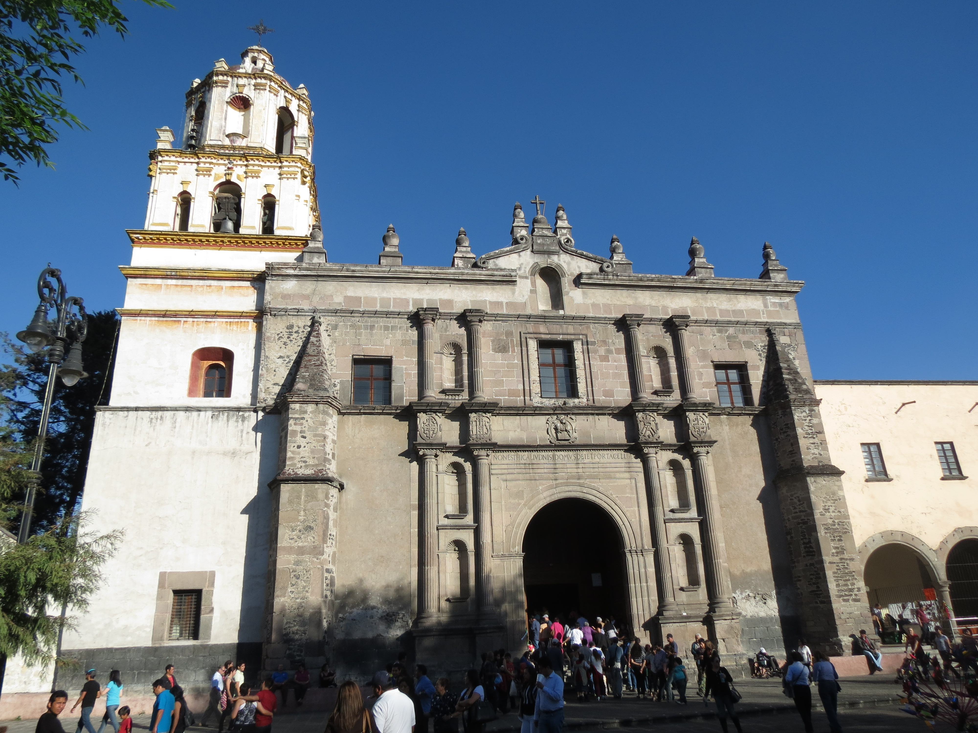 Iglesia de San Juan Bautista (Coyoacán)